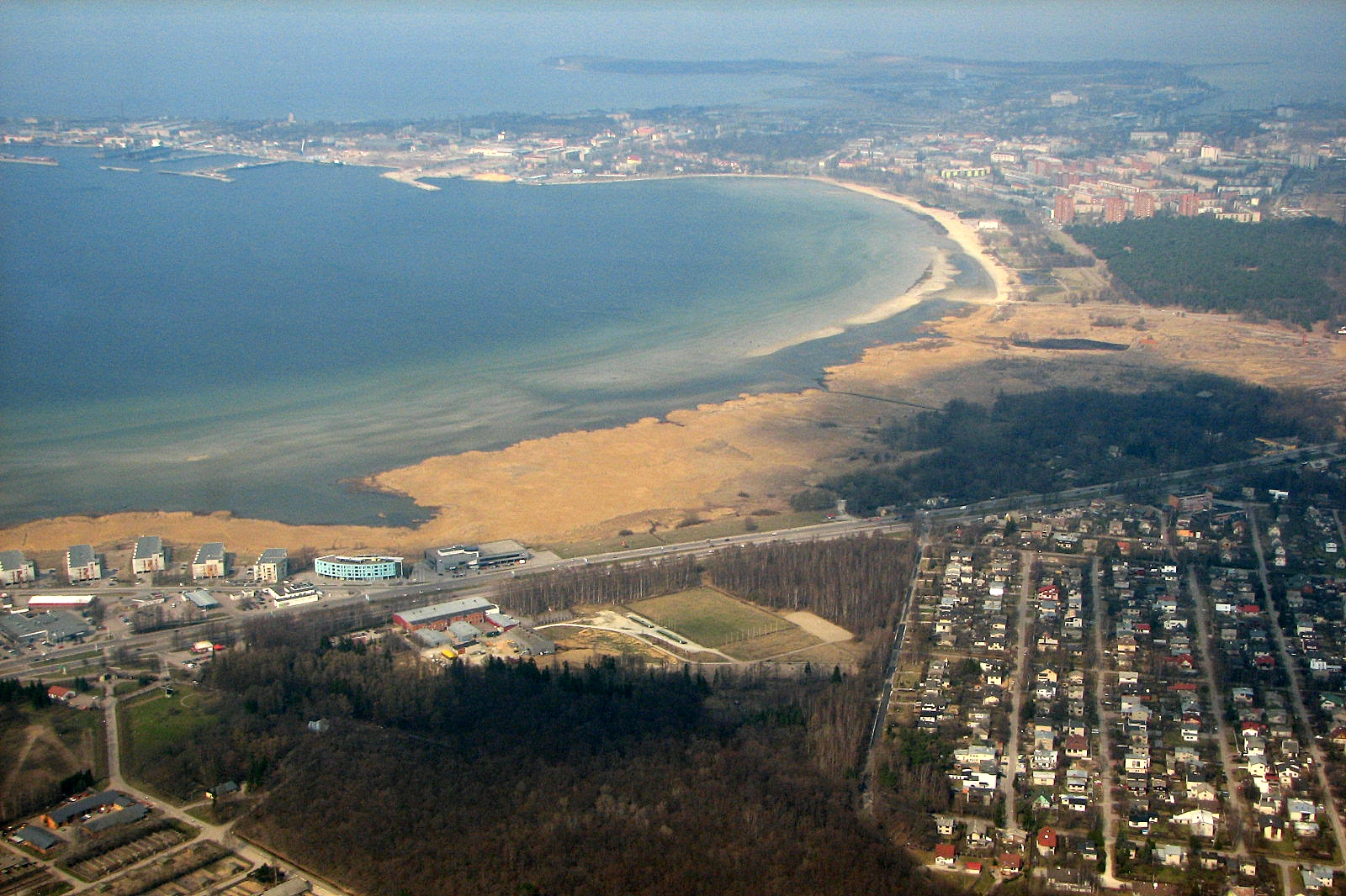 Kopli Bay and Kopli peninsula.